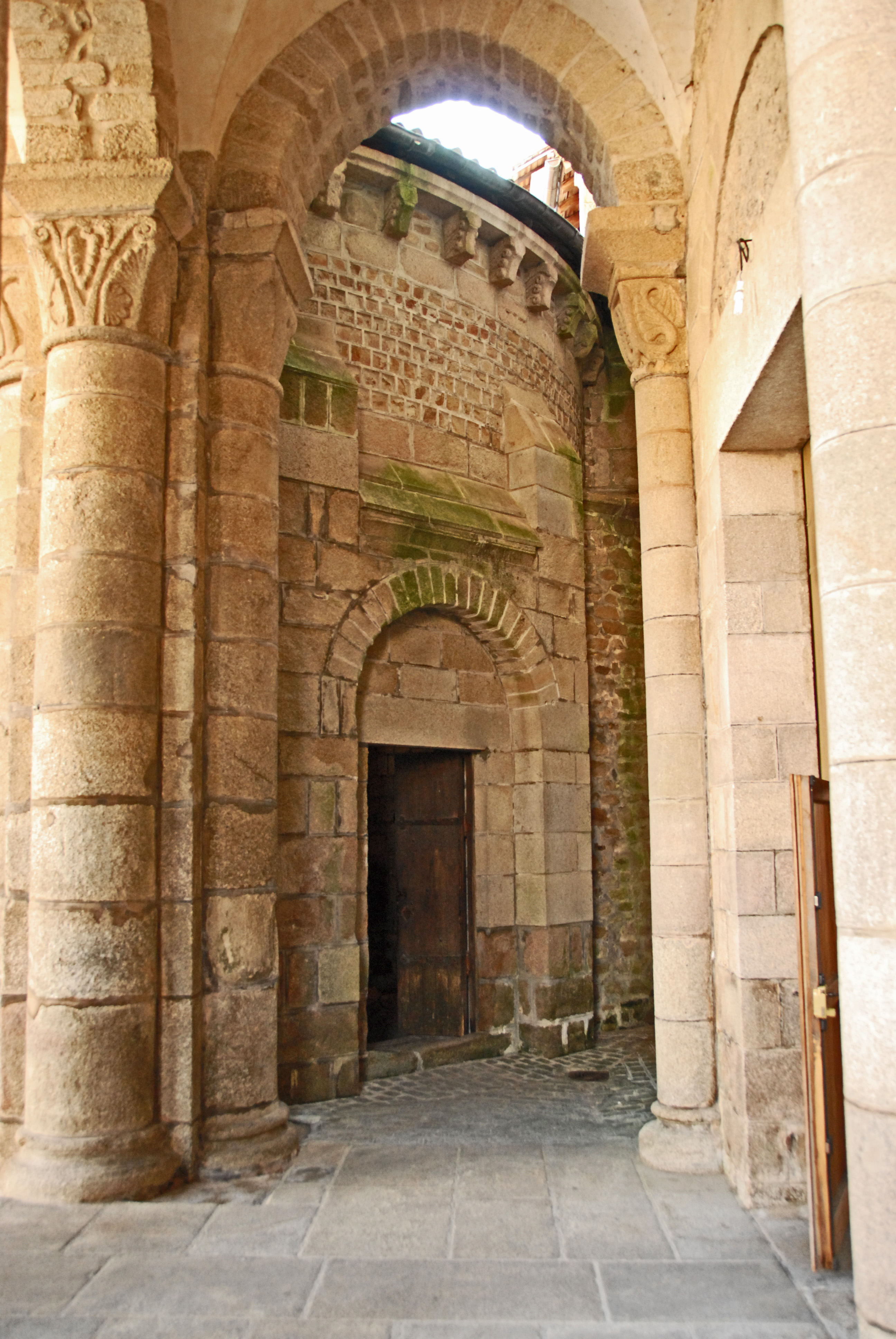 Stiftskirche St.-Léonard-de-Noblat, Grabeskapelle, aus Narthex zum Eingang